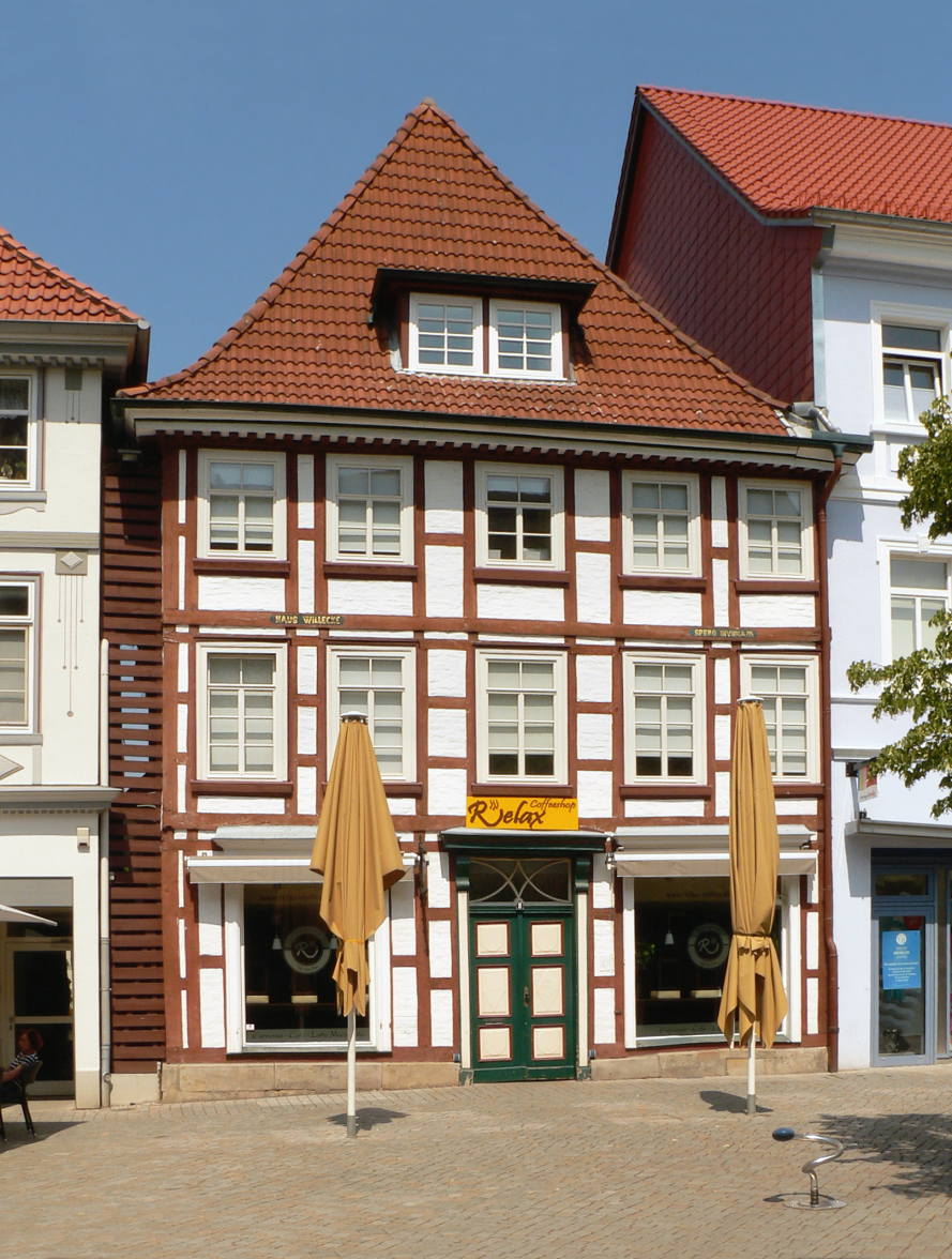 Hameln, Pferdemarkt 8, etwa 1940 bis 1942 als sogenanntes Judenhaus genutzt.